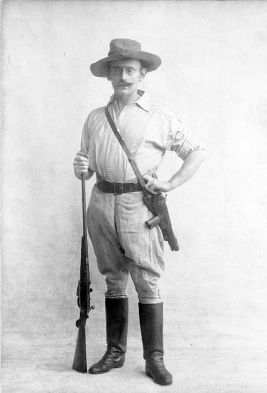 Scherl Bilderdienst: Peters, Dr. Karl [Carl], Forschungsreisender.